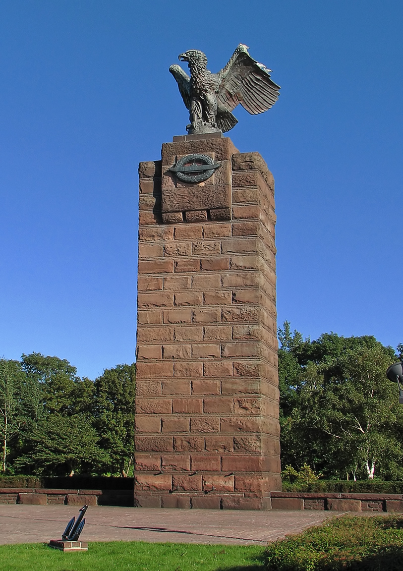 Beschreibung: U-Boot-Ehrenmal Möltenort / Heikendorf Gedankestätte für die gefallenen Ubootfahrer der deutschen Marine Fotograf: Darkone, 3. September 2005